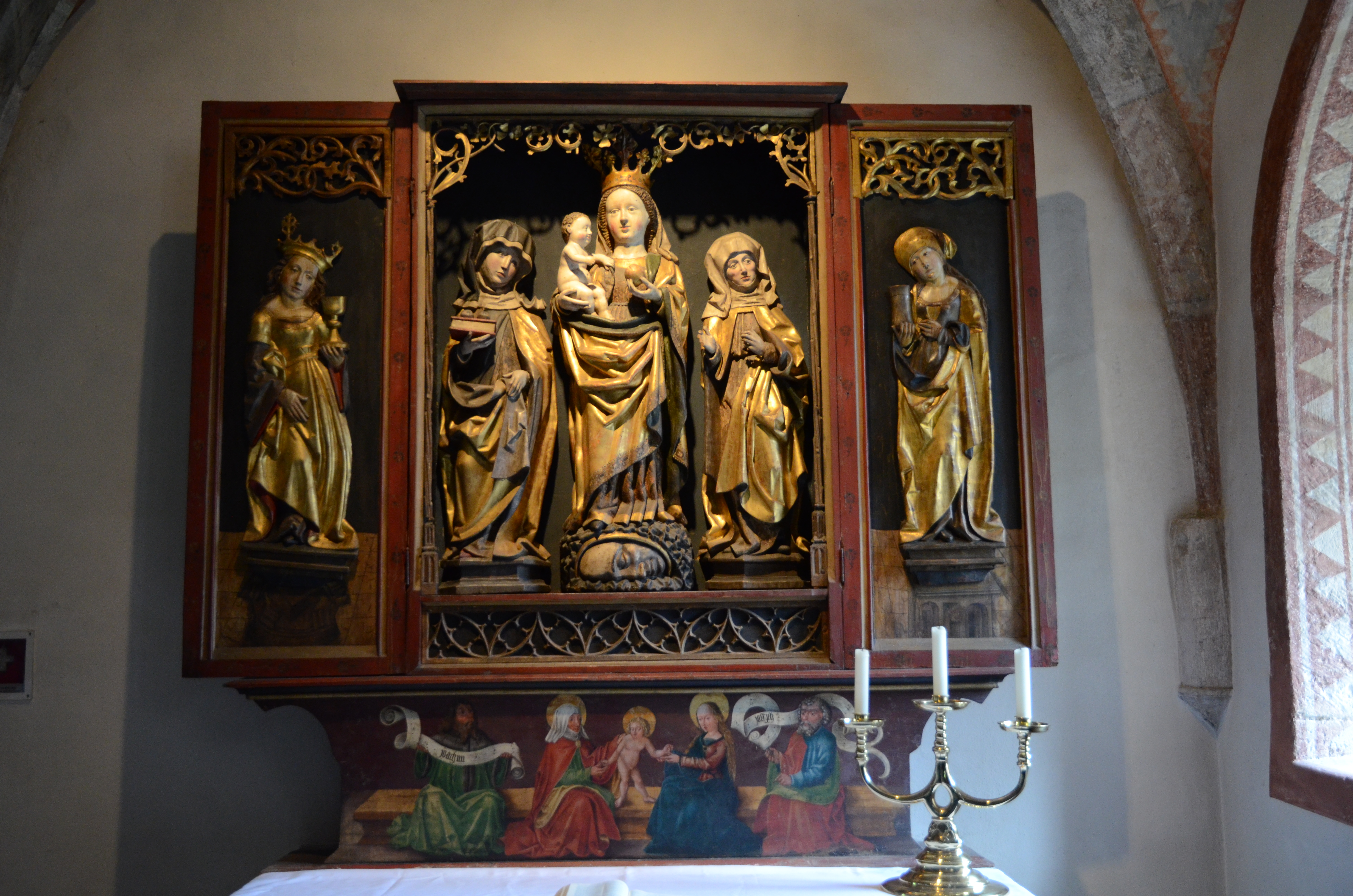 Evang.-luth. Kirche St. Peter und Paul im Stadtteil Detwang von Rothenburg ob der Tauber